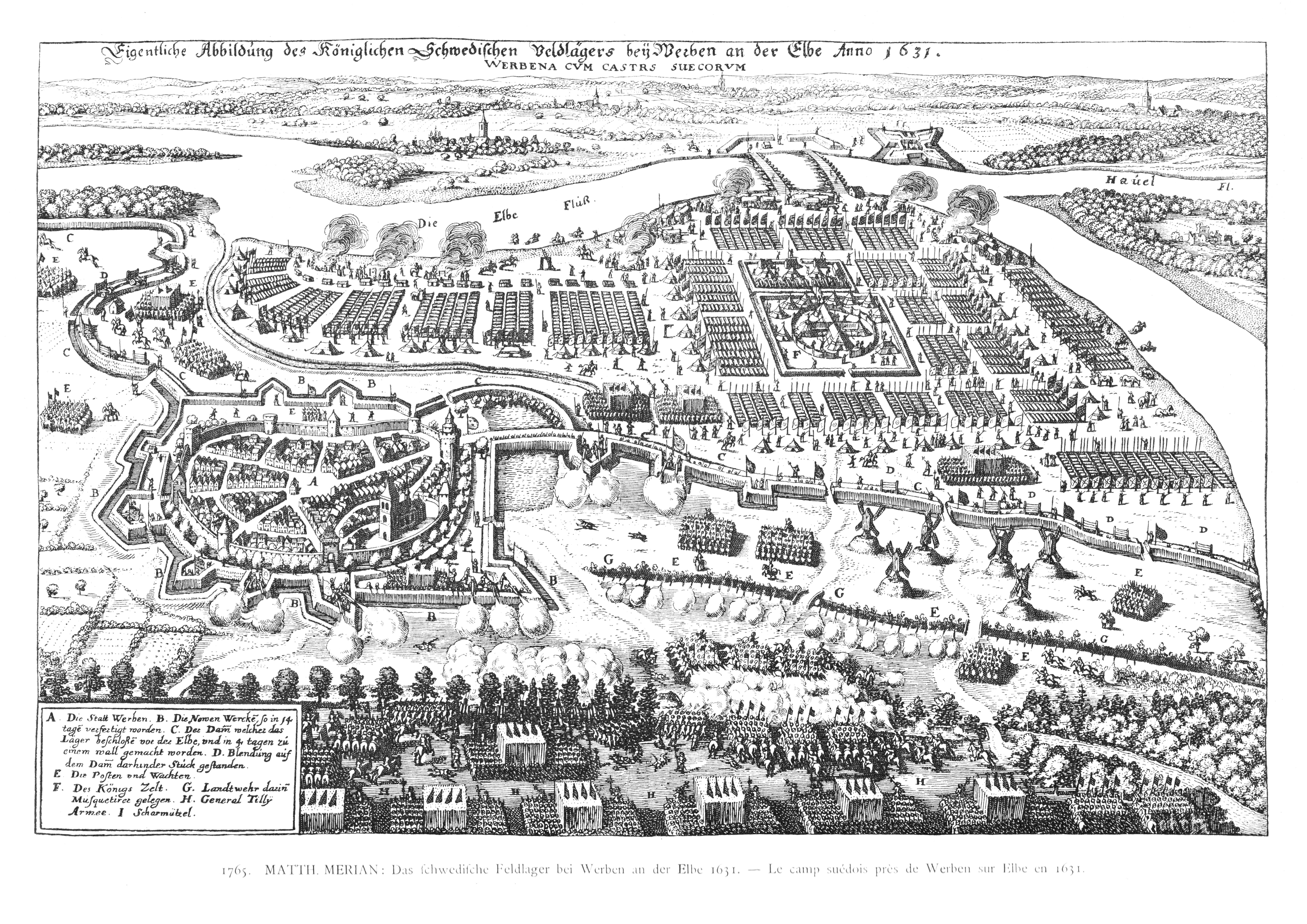 Original image description from the Deutsche Fotothek Werben (Elbe). Königlich Schwedisches Feldlager vor der Stadt, 1631, aus: Wollesen, Ernst: Chronik der altmärkischen Stadt Werben, 1898